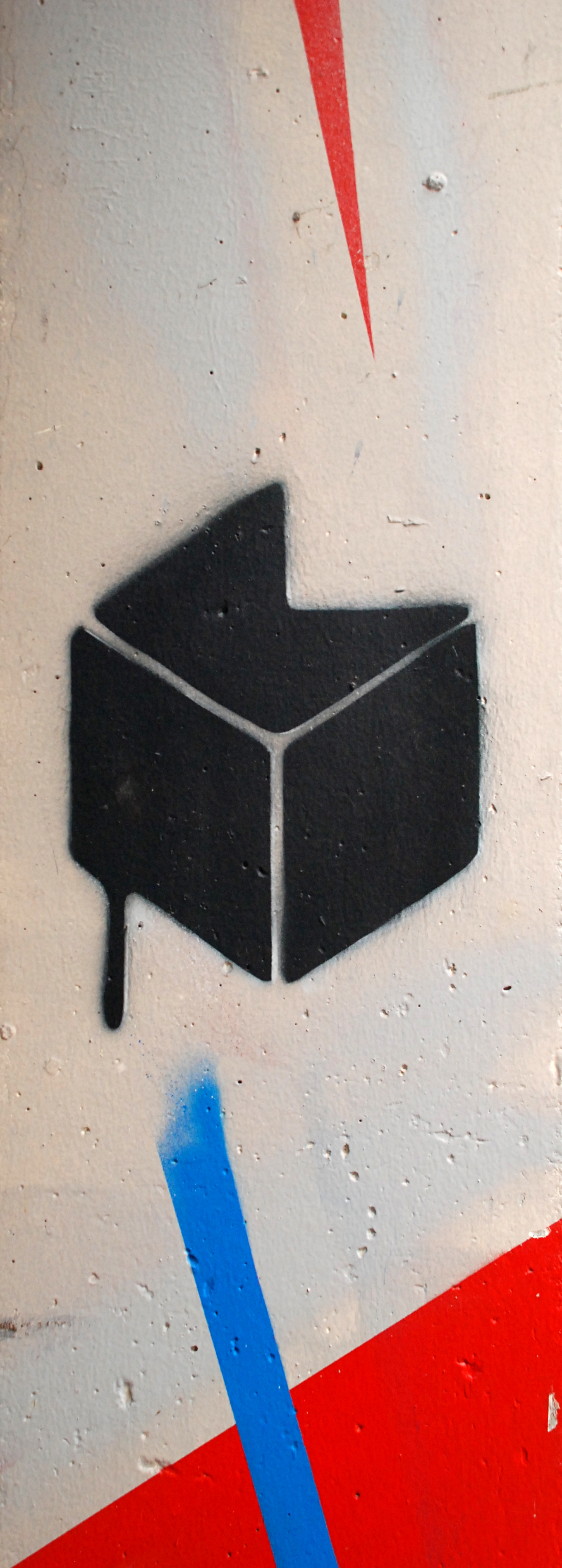 Belgique - Louvain-la-Neuve - Théâtre Jean Vilar - fresque du graffeur français Damien-Paul Gal (Kosmopolite Art Tour 2015)